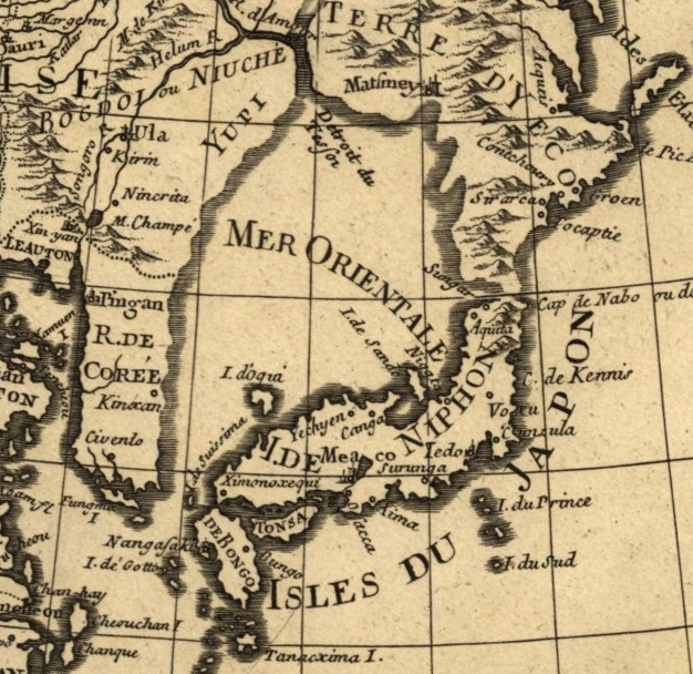 Guillaume Delisle (1675–1726): L'Asie, Paris 1700 Maßstab: ca. 1:21000000 Größe des Originals: 59 x 46 cm